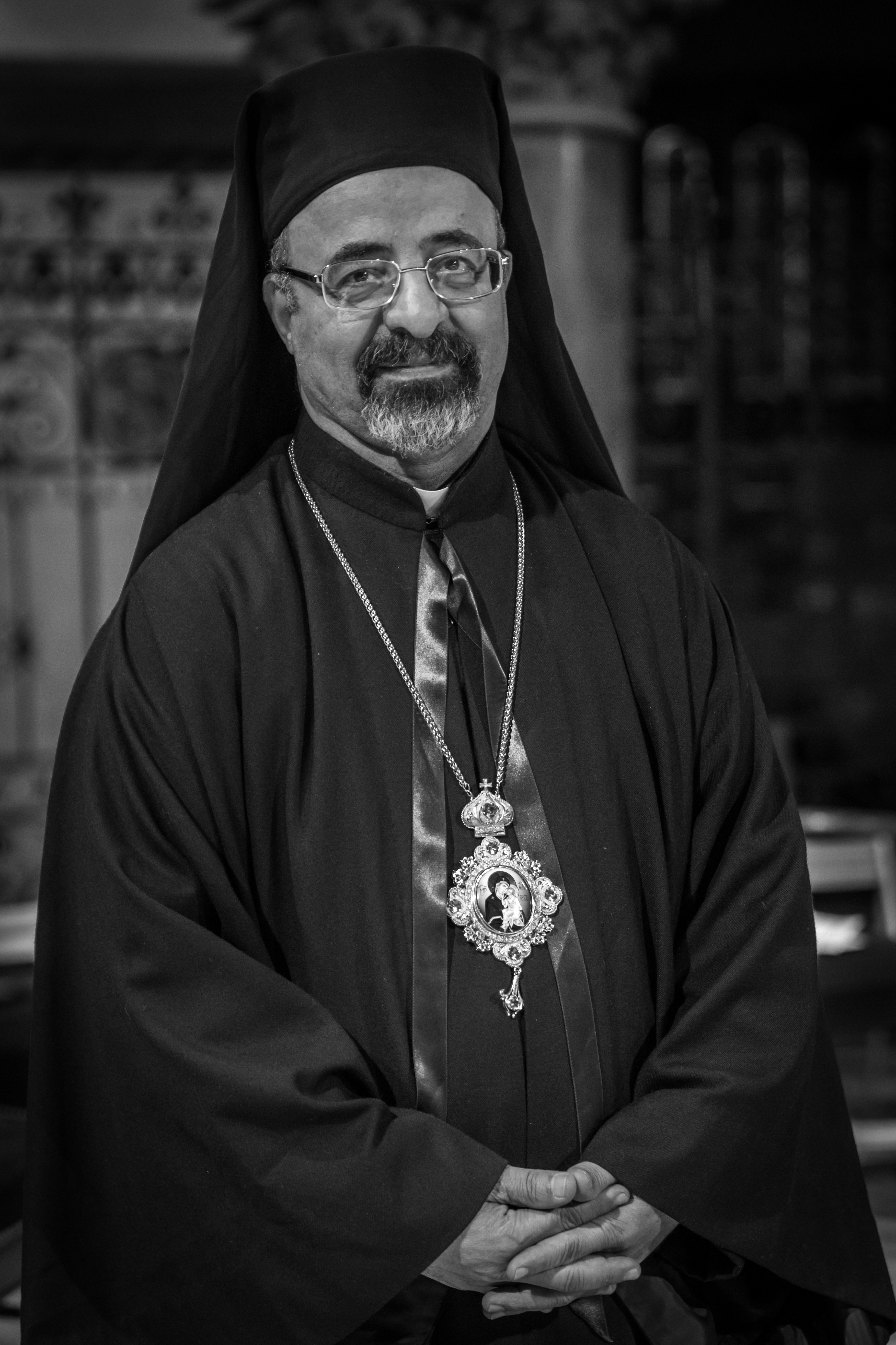 Ibrahim Isaac Sidrak, né à Beni-Chokeir dans le gouvernorat d'Assiout en Égypte le 19 août 1955, est un évêque égyptien, patriarche d'Alexandrie, primat de l'Église catholique copte depuis 2013.